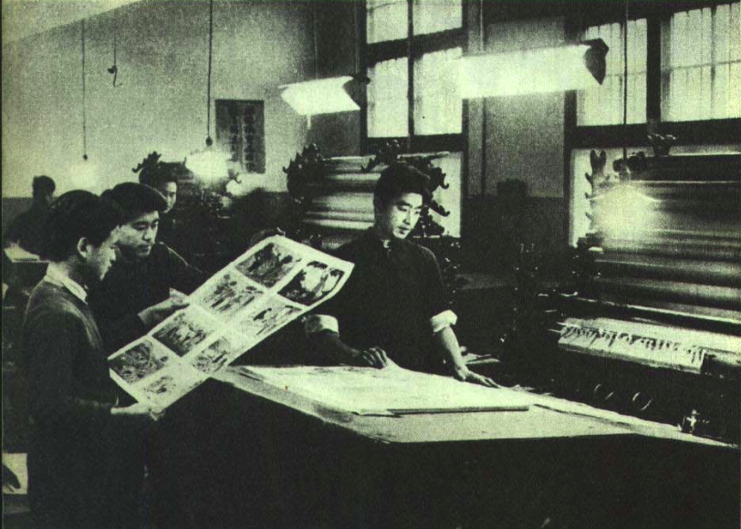 1953年北京人民印刷厂